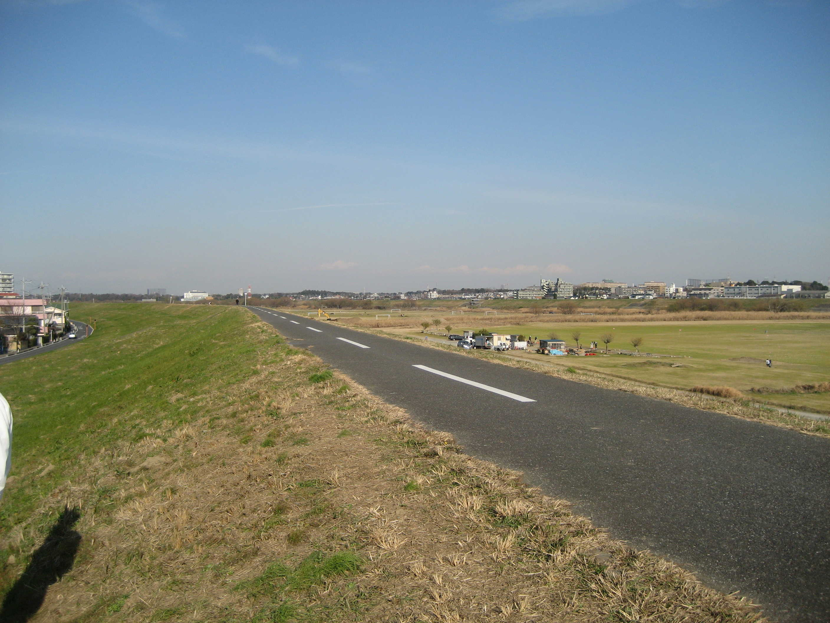 埼玉県道156号三郷幸手自転車道線三郷市内